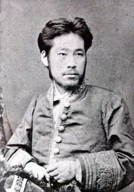 江木高遠（1849 - 1890）は、日本の学者・啓蒙家・外務官僚。